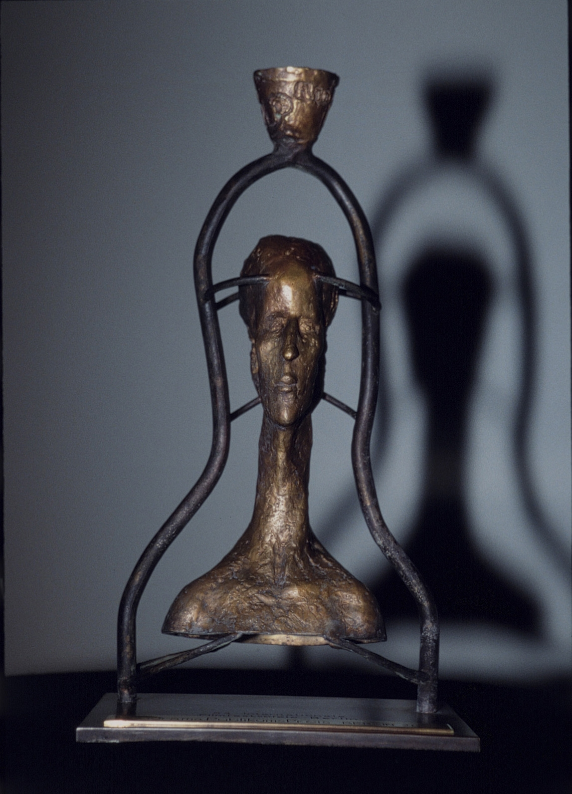 Die 40 cm hohe Bronzeskulptur von Hubertus Brand wurde von 1999 bis 2008 dem Gewinner des Panorama Publikumspreises übergeben.